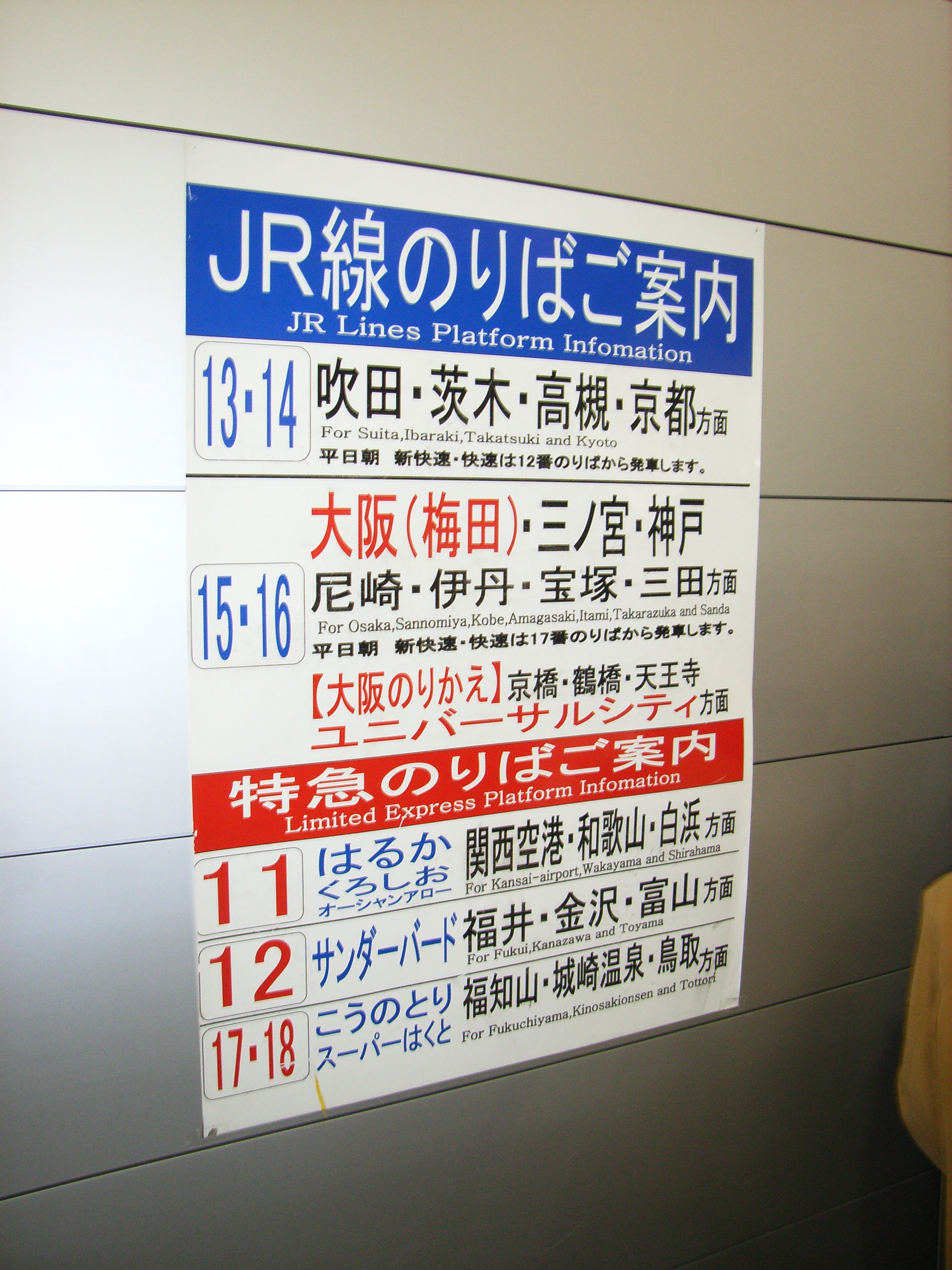 新大阪駅にある在来線乗り場案内。「大阪（梅田）」の表示がある。(2014年3月撮影)